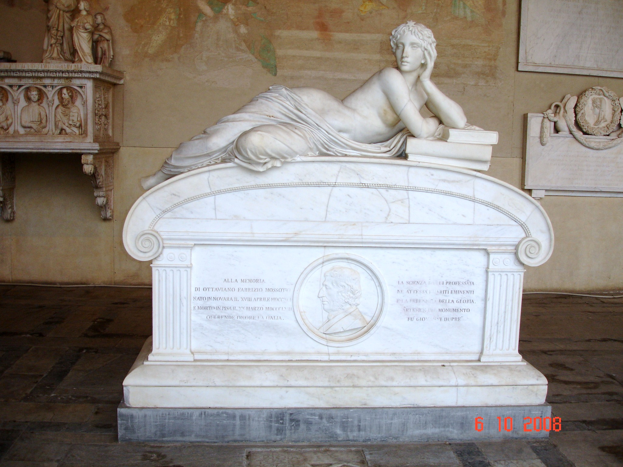 Camposanto de Pisa